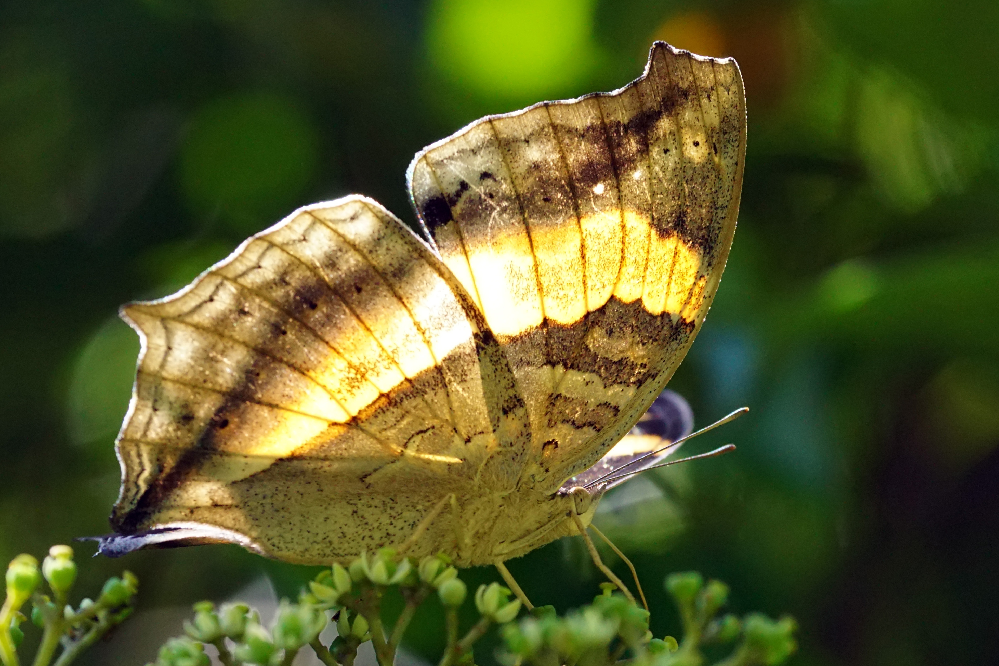 黃帶隱蛺蝶 Yoma sabina podium